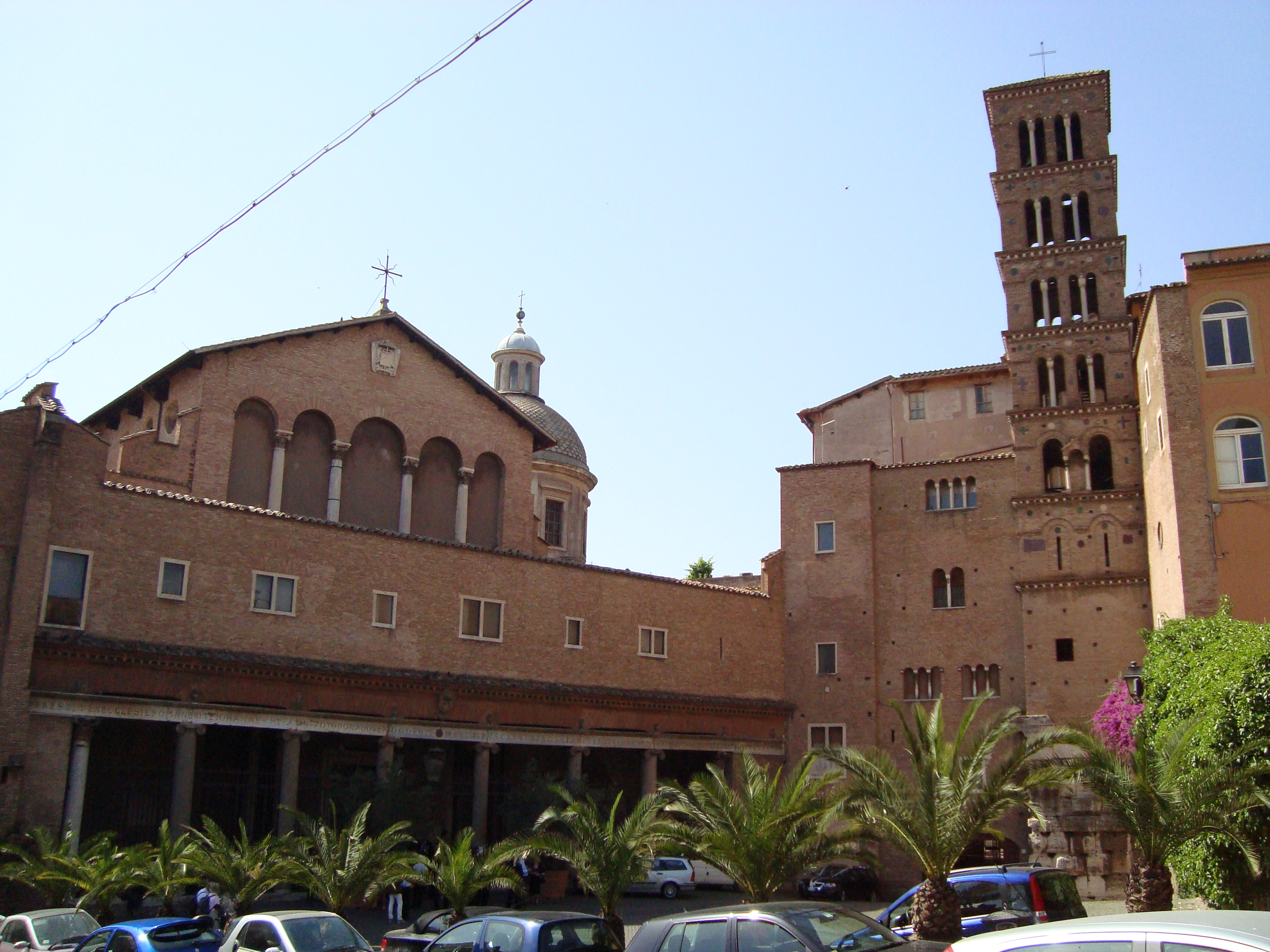 Vue d'ensemble de la Basilique Santi Giovanni e Paolo de Rome sur le Celio